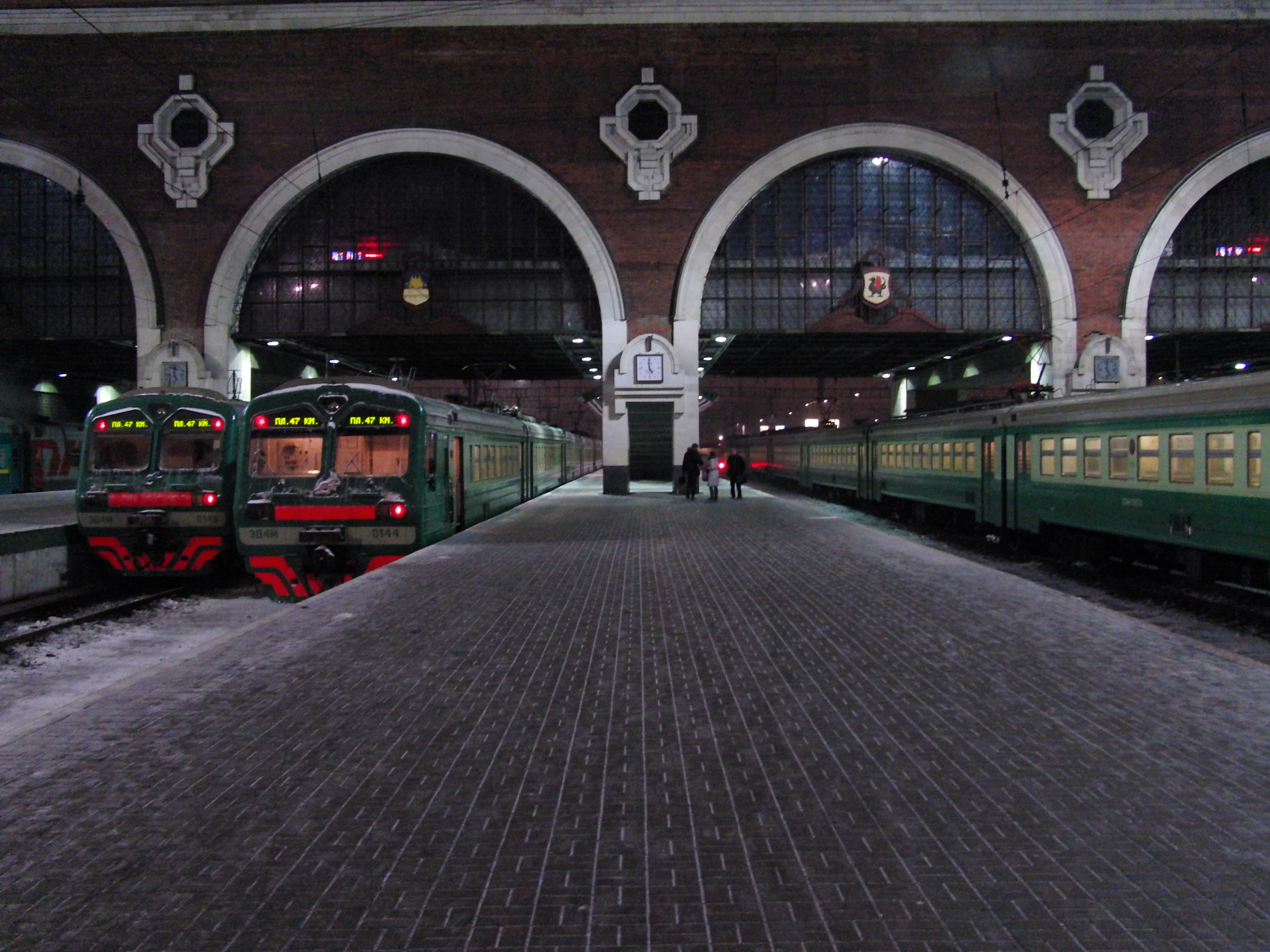 Kazansky Rail Terminal, local trains (Казанский вокзал, пригородные поезда)